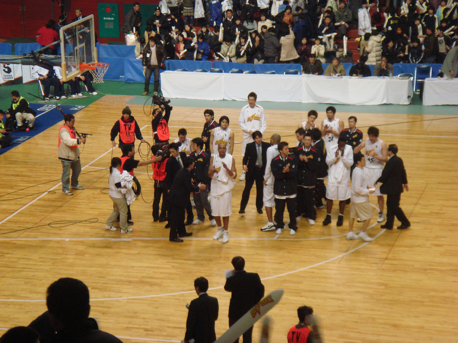 JBLスーパーリーグ。秋田市立体育館にて投稿者撮影 2007/03/18